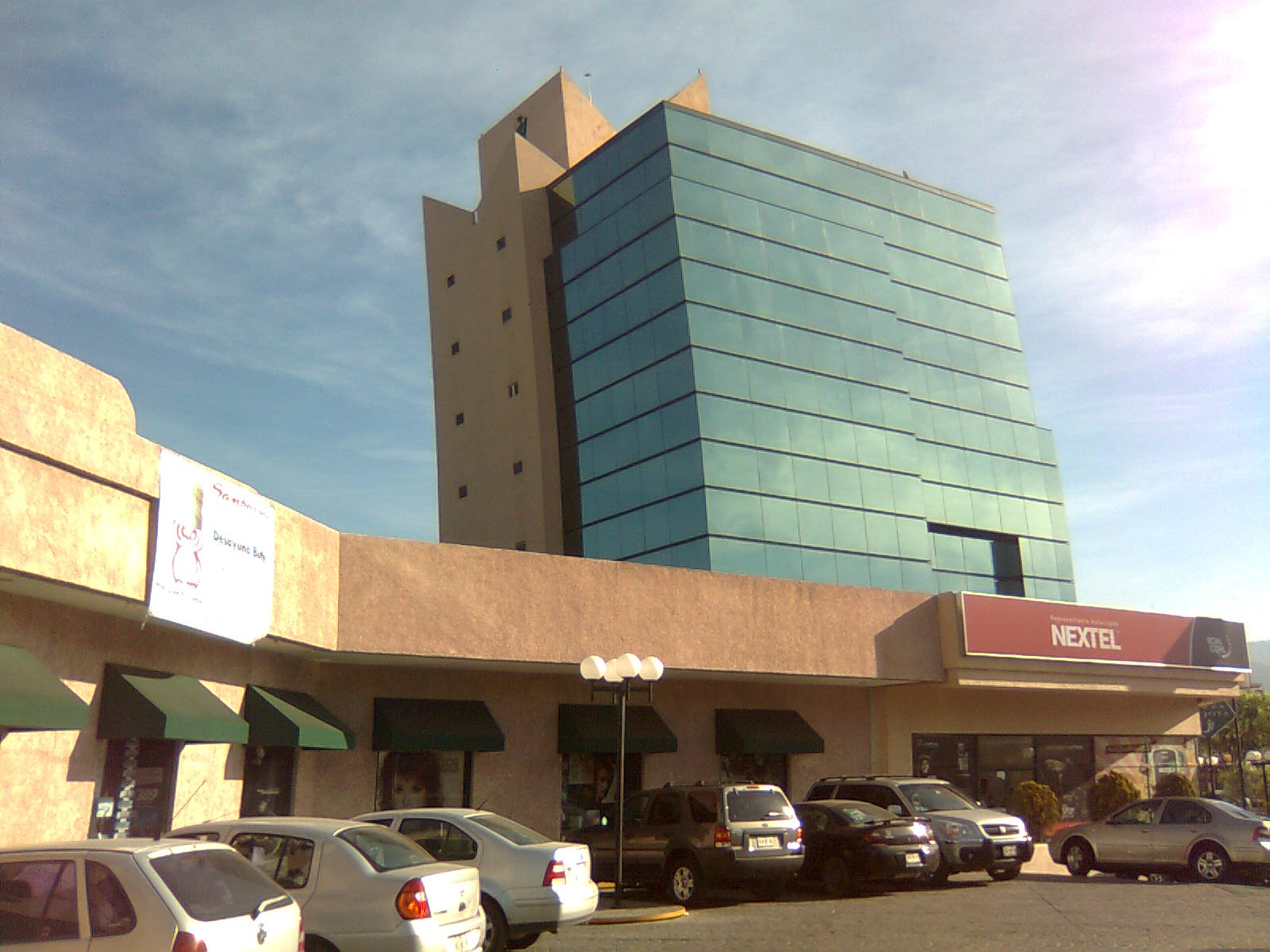 Hotel y plaza comercial La Joya en Pachuca de Soto